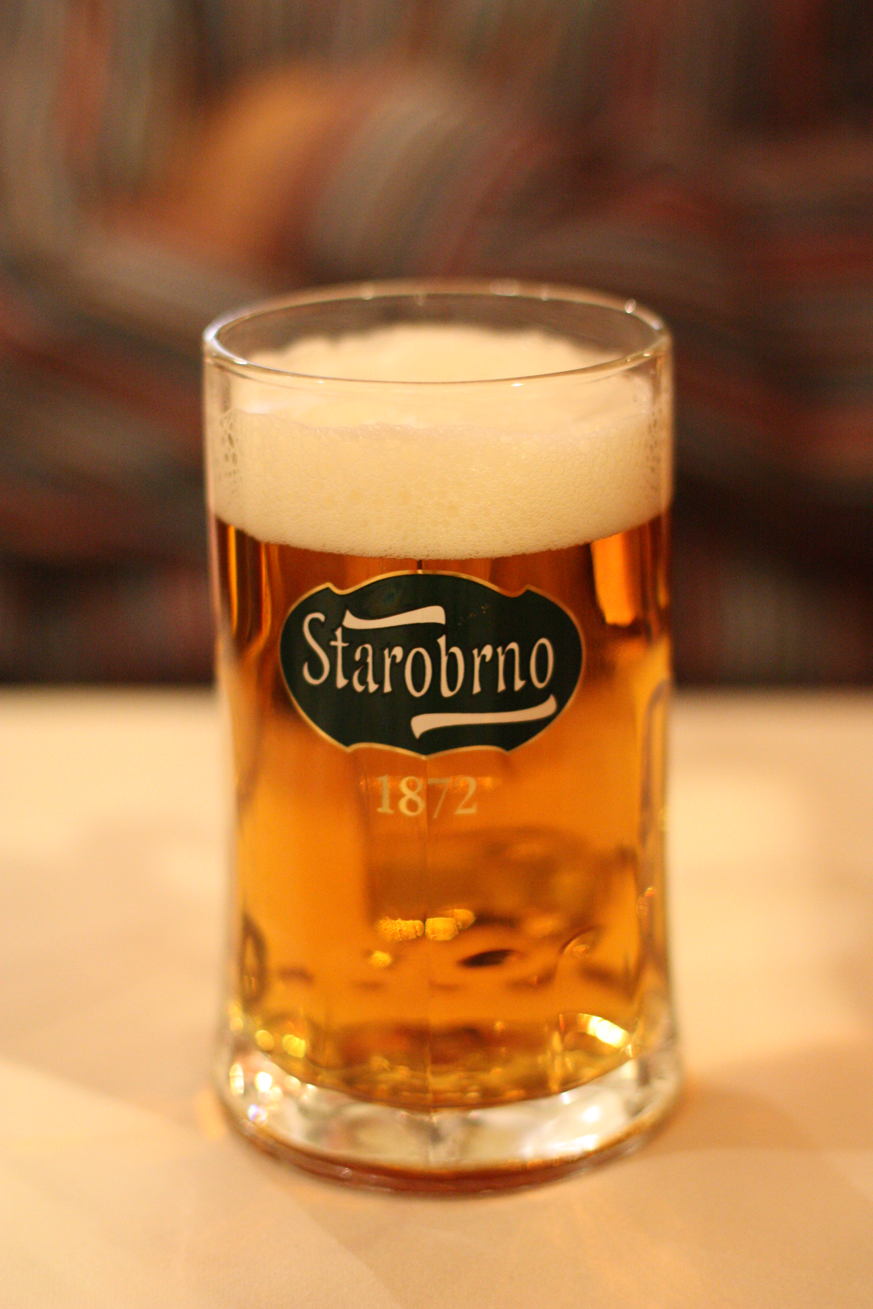 Starobrno (Wein 2009)